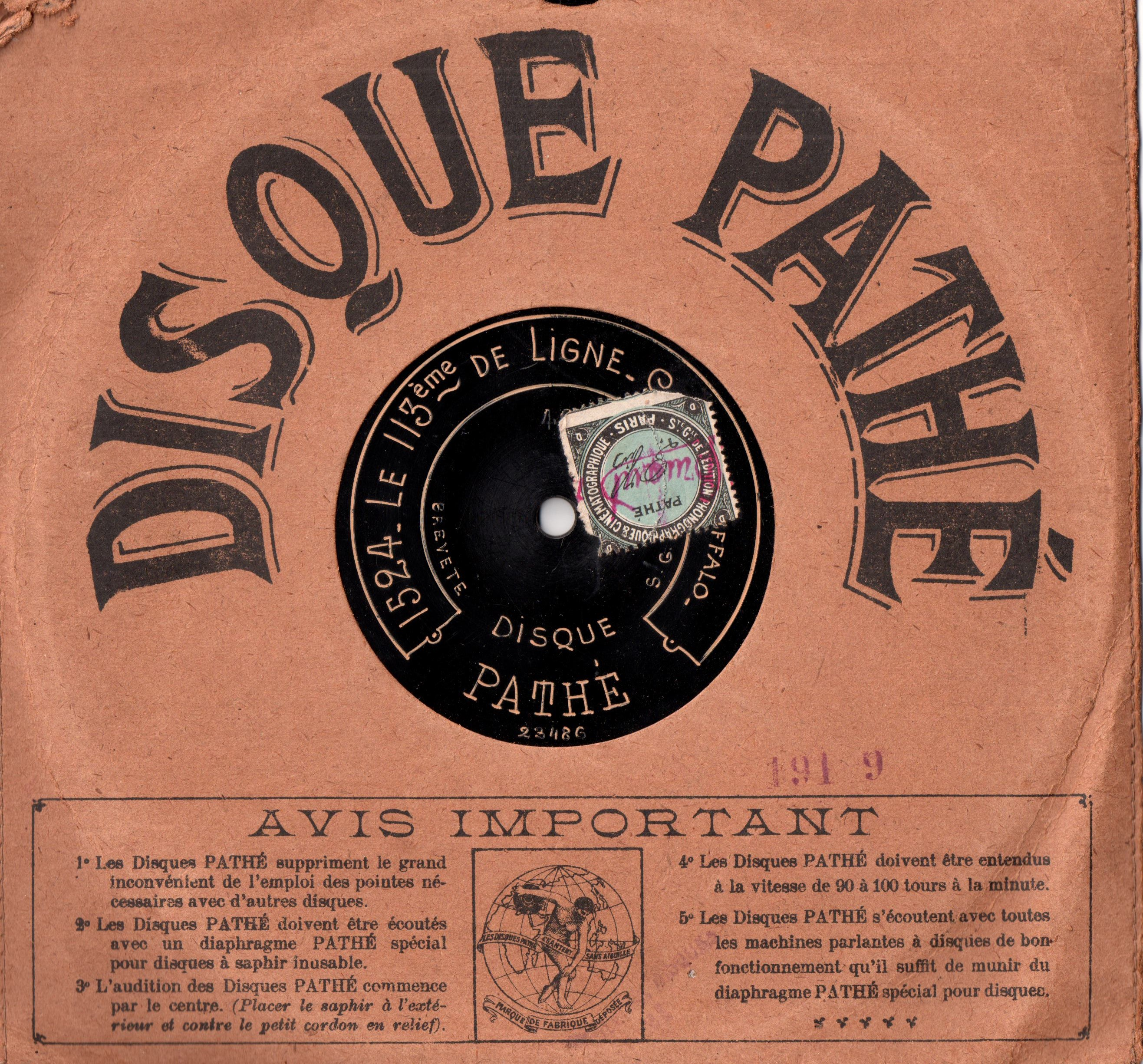 Disque 90T/min Pathé. (Diamètre, 21 cm). Départ au centre. Circa 1910.